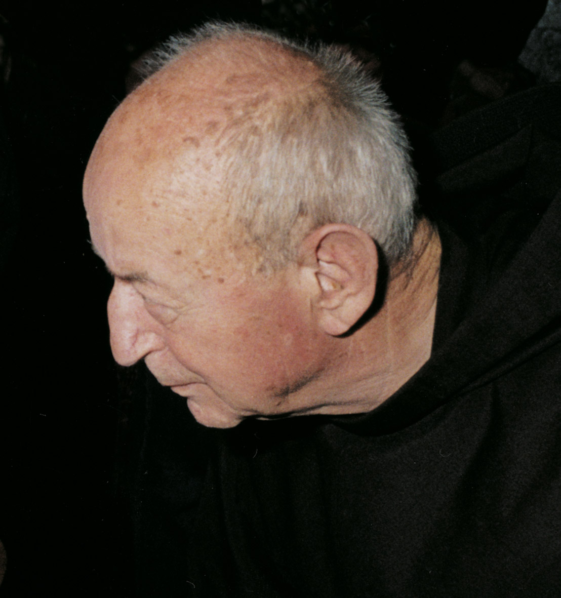 Fra Bonaventura Duda, teolog i bibličar